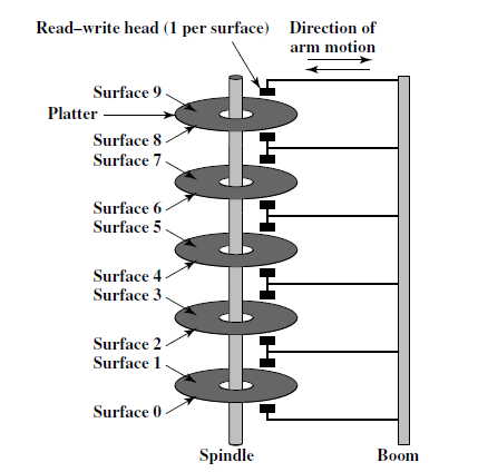 Komponentet e diskut